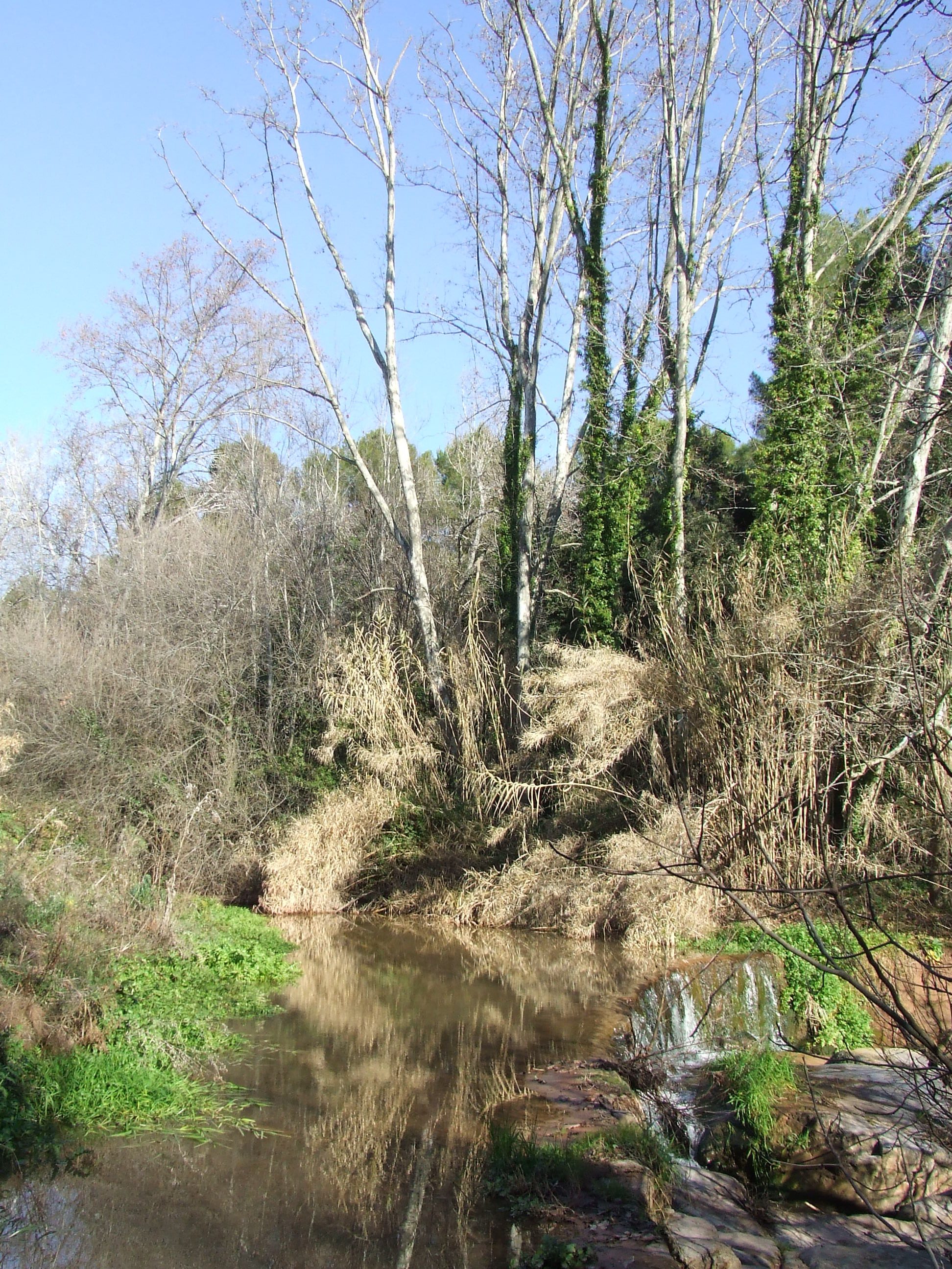 Les Barbotes (Bigues, Bigues i Riells, Vallès Oriental)